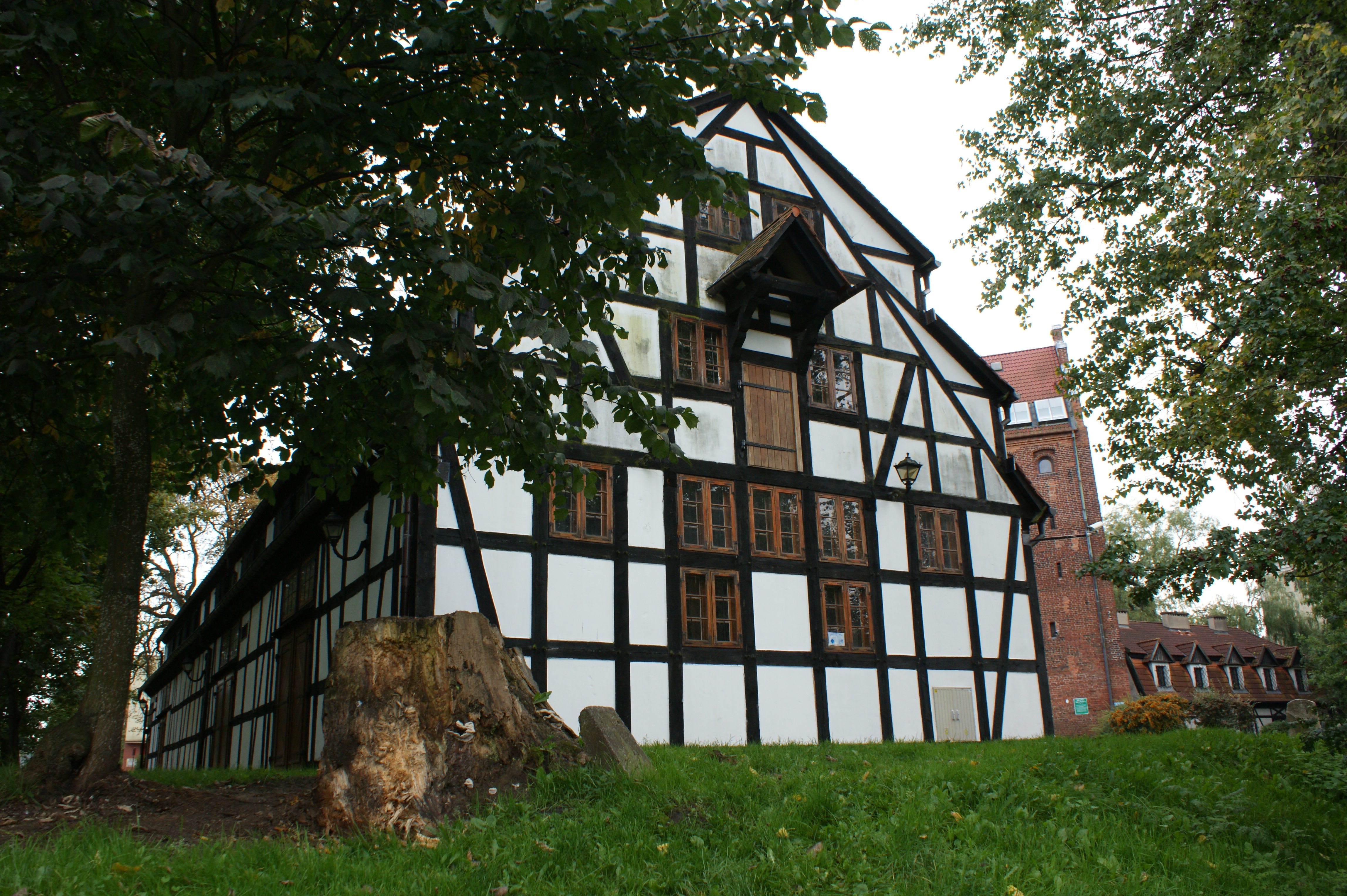 Słupsk - Spichlerz Richtera